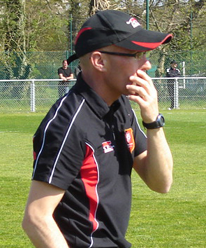 Landry Chauvin en 2007